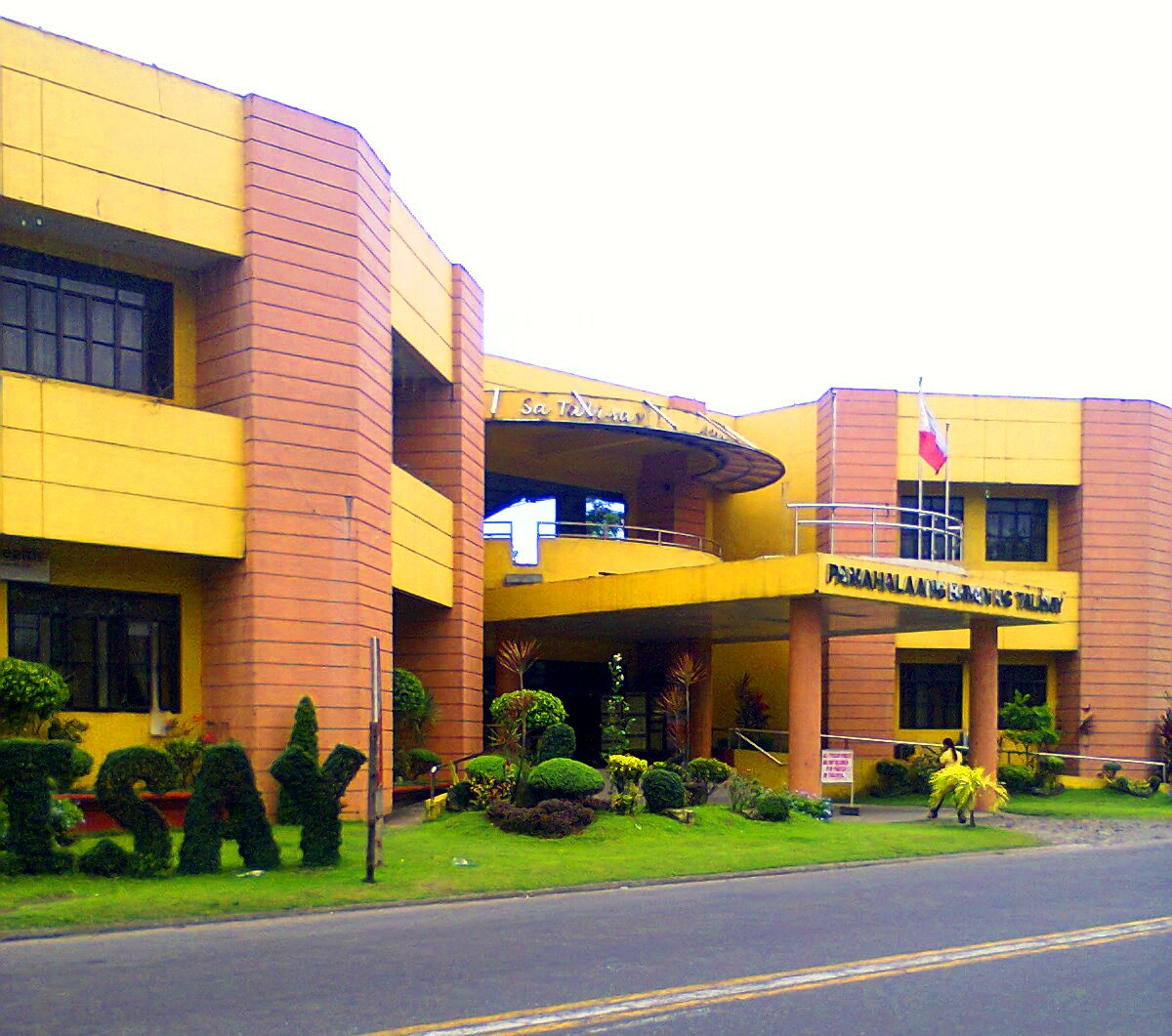 Talisay, Camarines Norte, Philippines